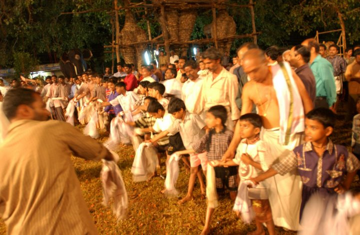 തോത്താകളി